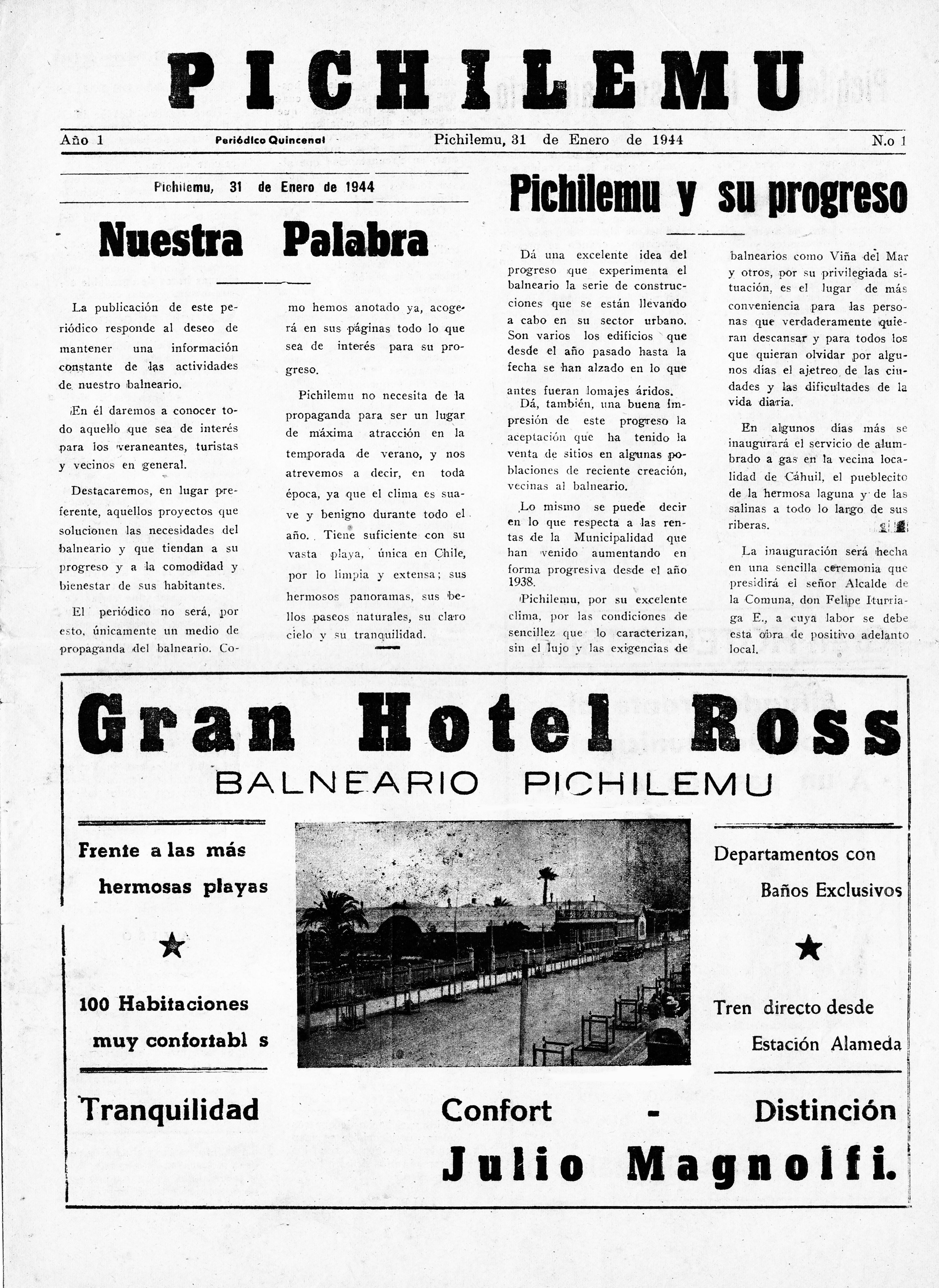 Periódico Pichilemu, editado por Carlos Rojas Pavez, Miguel Larravide Blanco, y José Arraño Acevedo. Edición número 1, del 31 de enero de 1944.